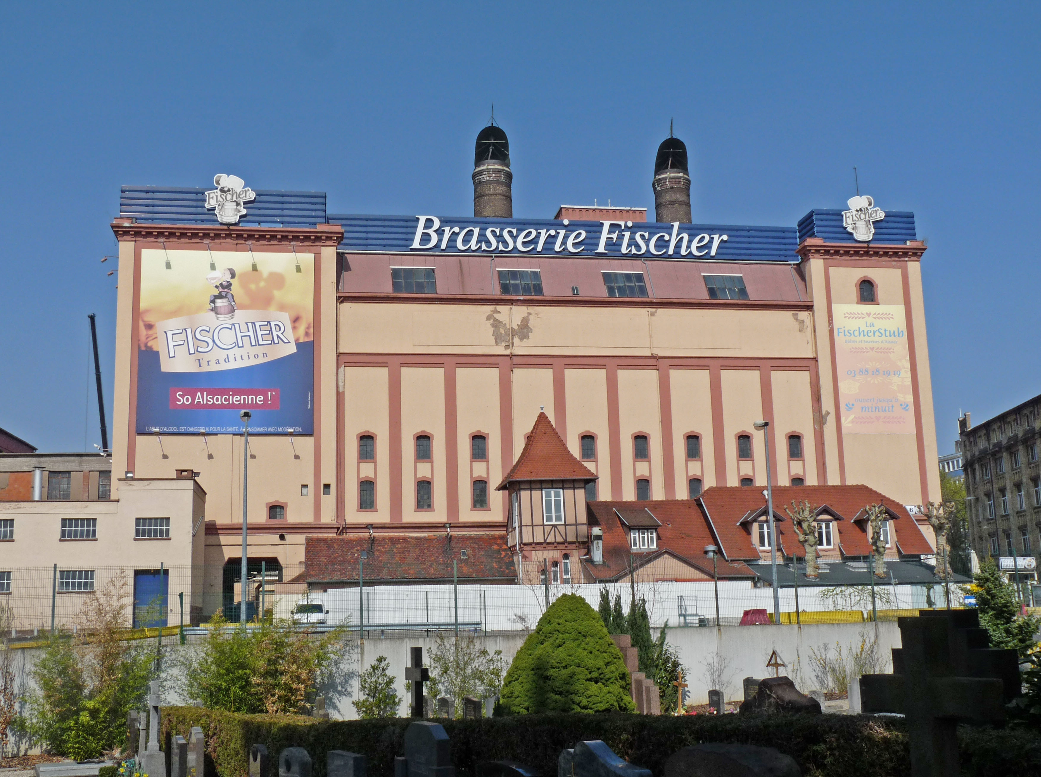 Ancienne brasserie Fischer à Schiltigheim (Bas-Rhin)